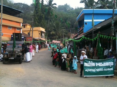 കുടപ്പനമൂട് നബിദിന റാലി